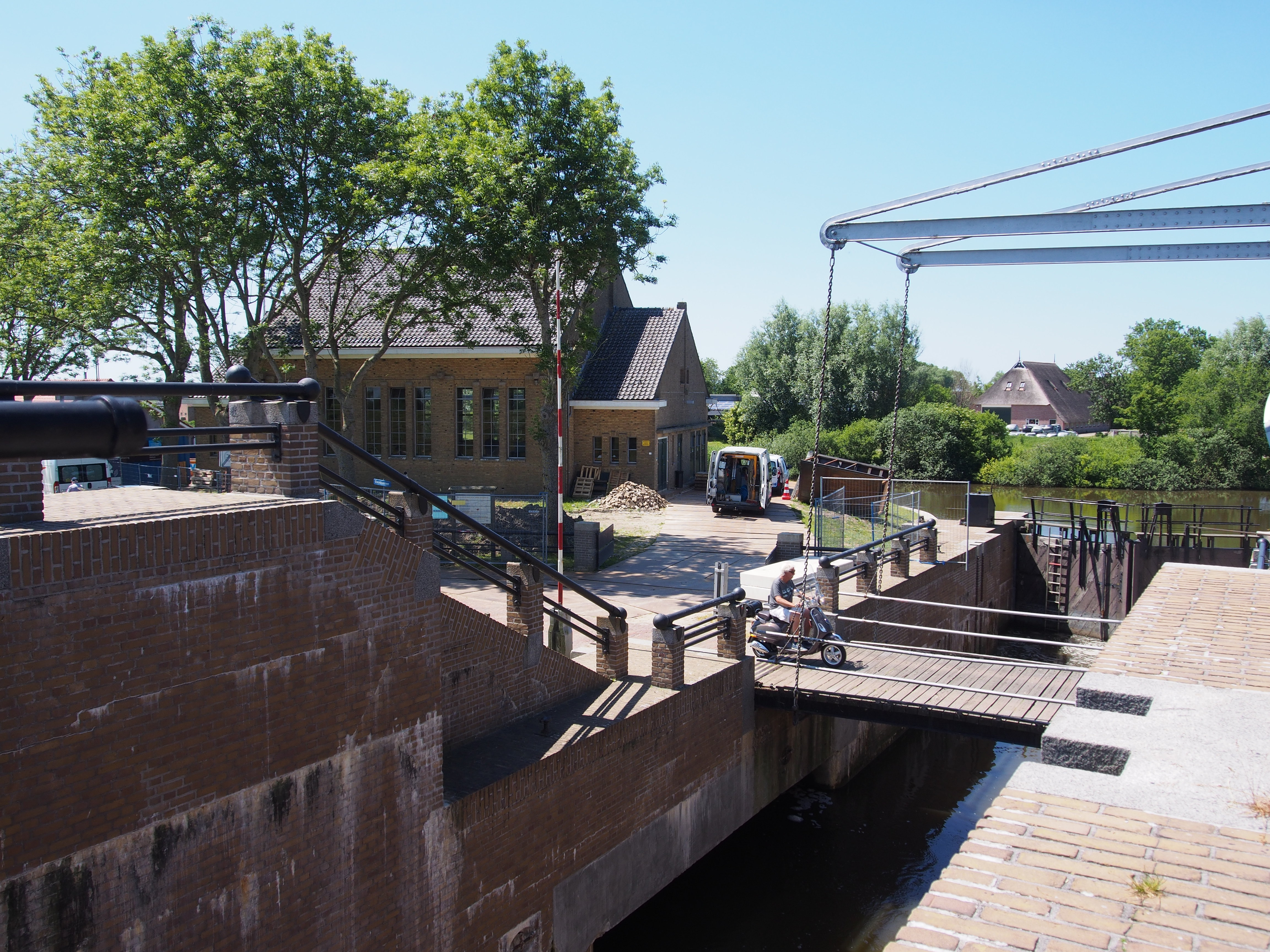 Gemaal Dongerdielen tijdens restauratie in 2015